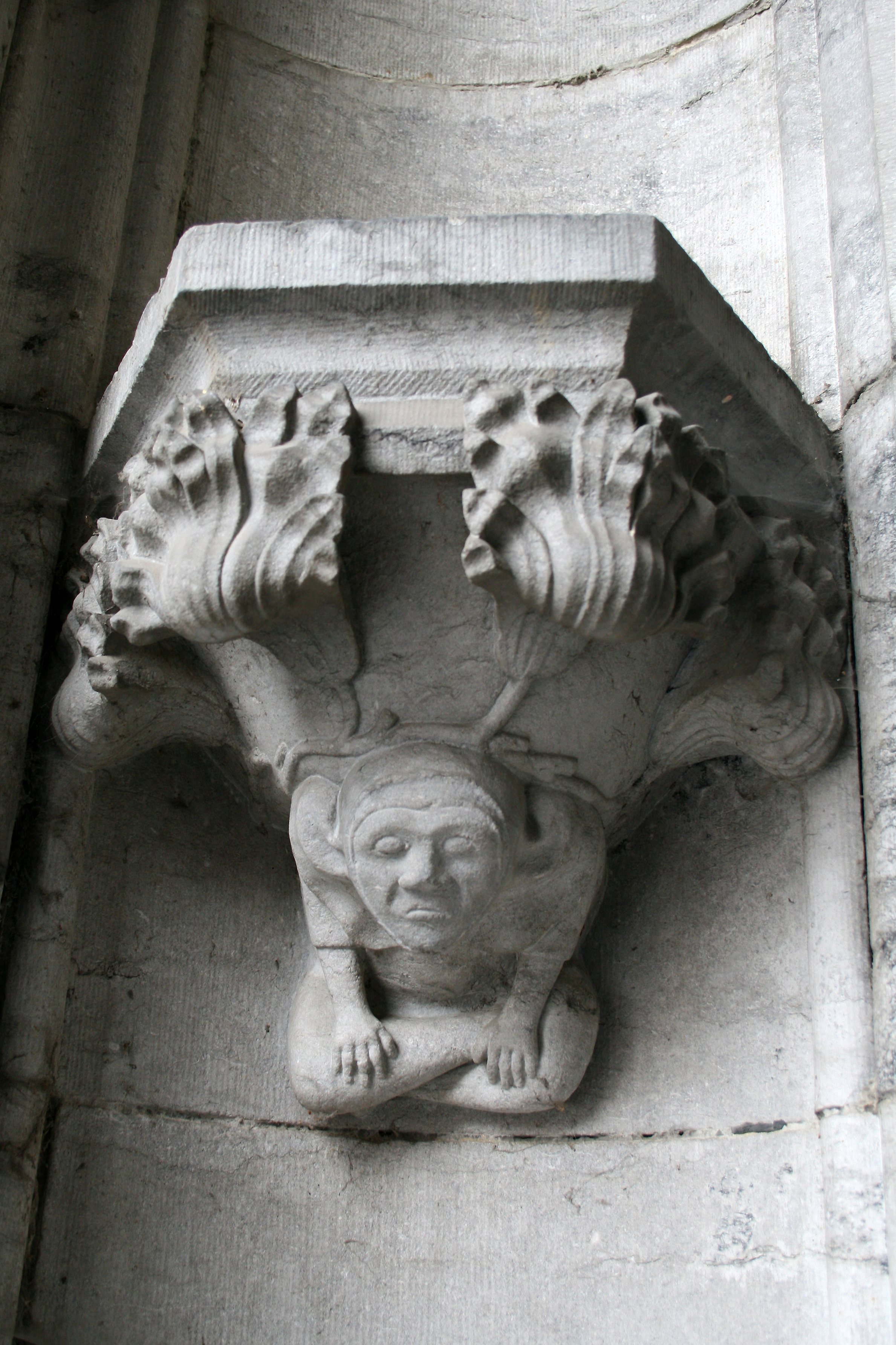 Cul-de-Lampe du portail de la Basilique Saint-Materne (XVIe siècle) - Walcourt (Belgique).